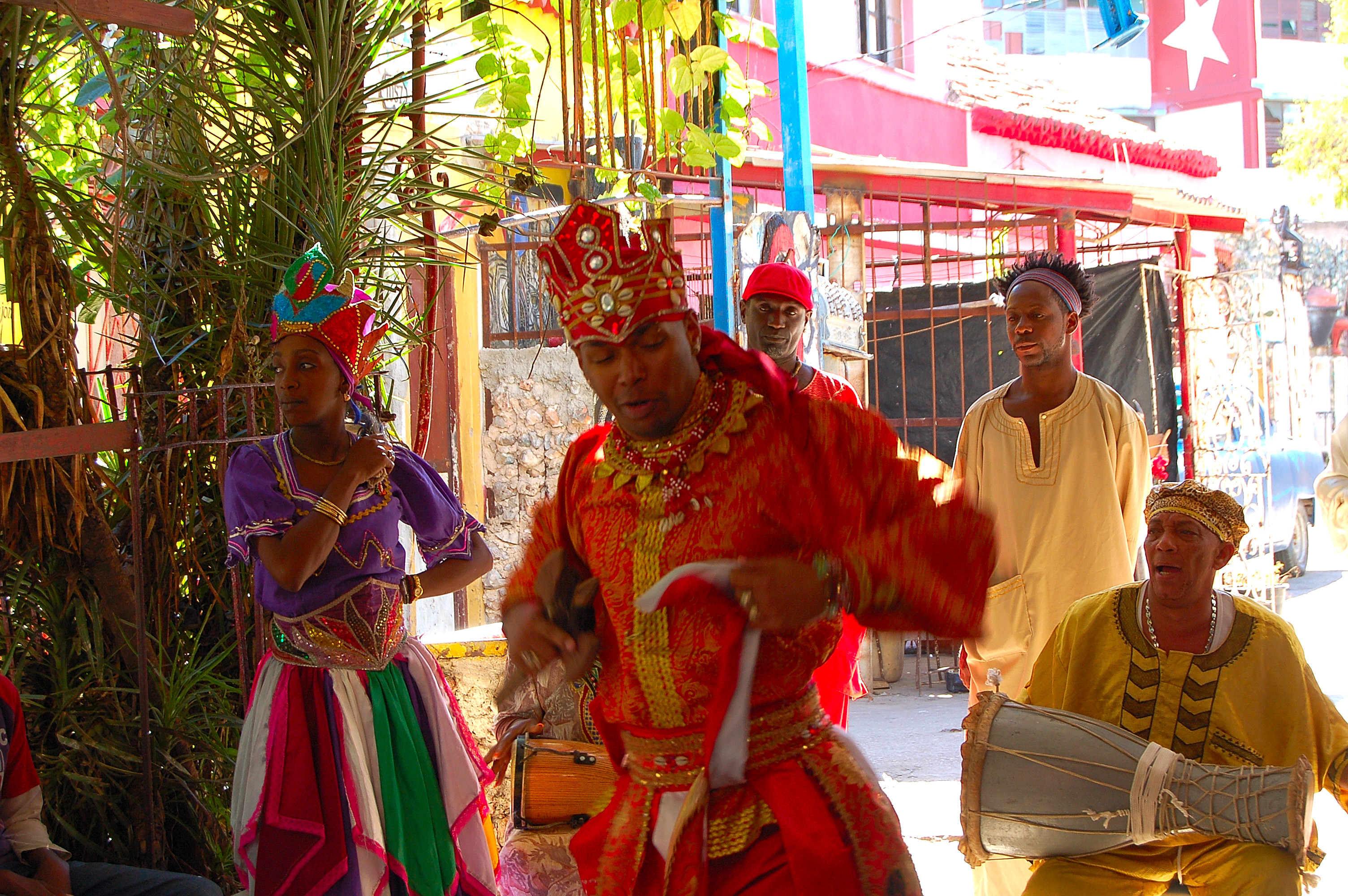 Centro Habana Santeria